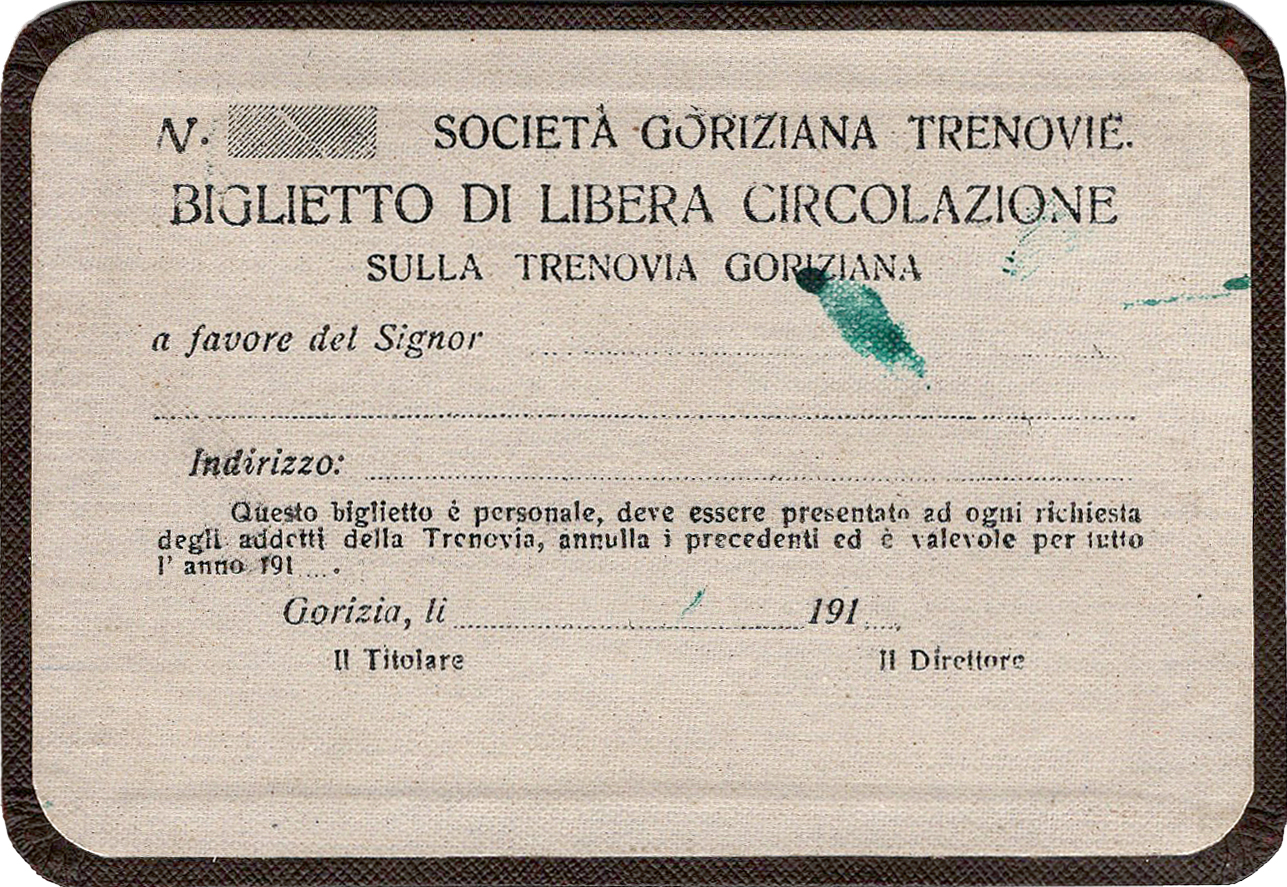 Biglietto originale, di mia proprietà, ereditato da mio nonno materno, Arrigo Dini che lo acquisì durante la I° guerra Mondiale essendo stanziato nell'area Goriziana.